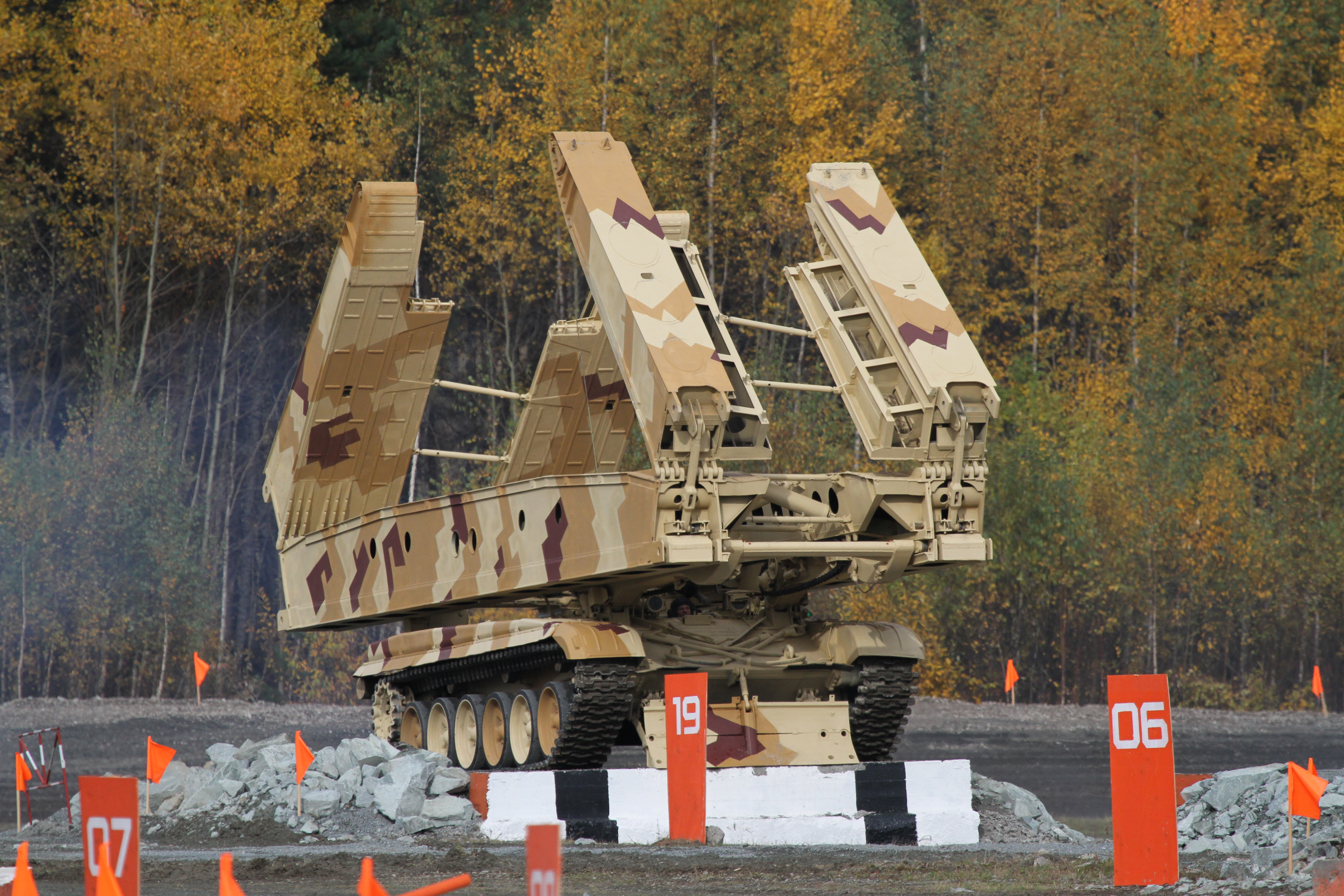 Танковый мостоукладчик МТУ-72 (Bridge layer MTU-72)